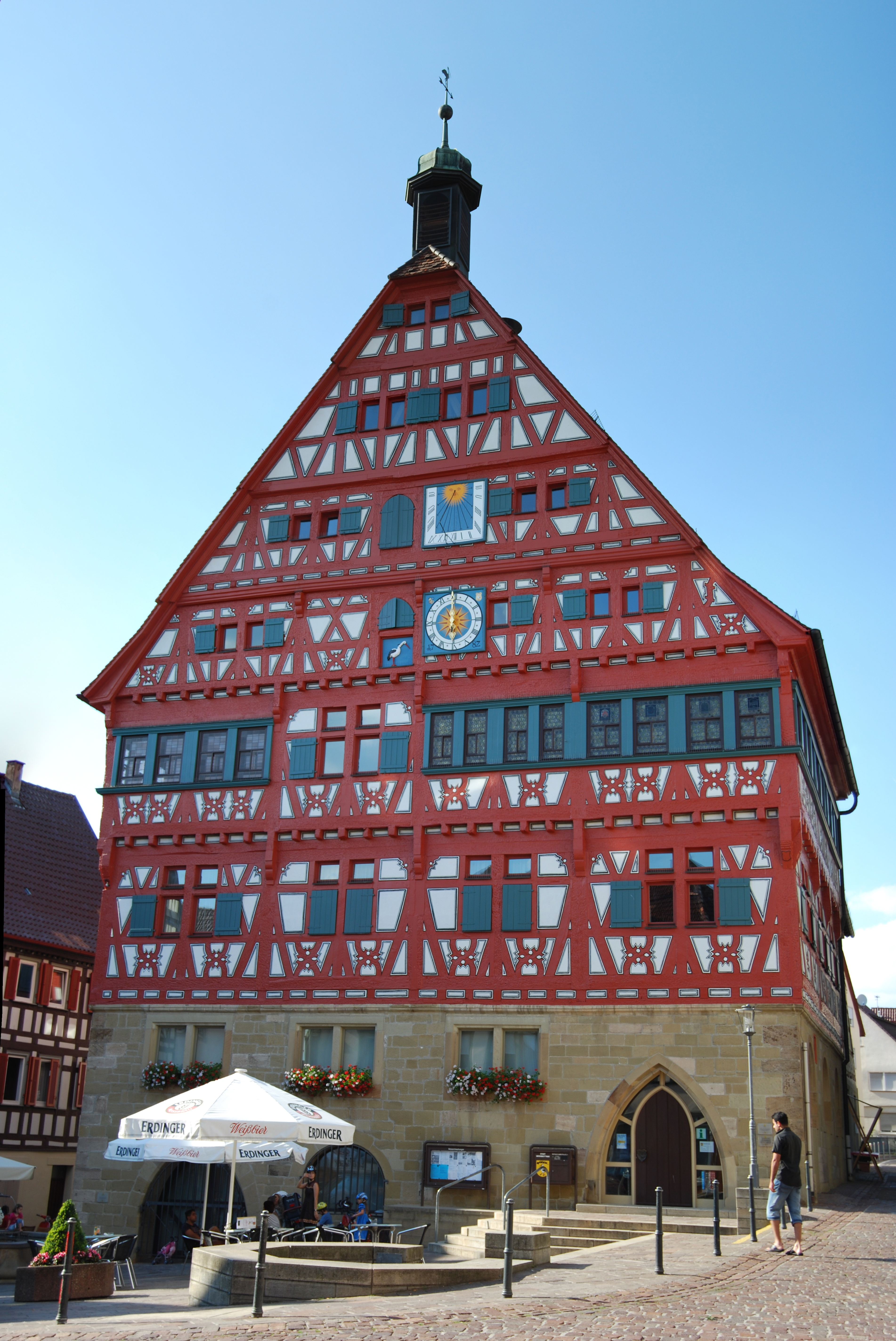 Rathaus Großbottwar, vier Teile